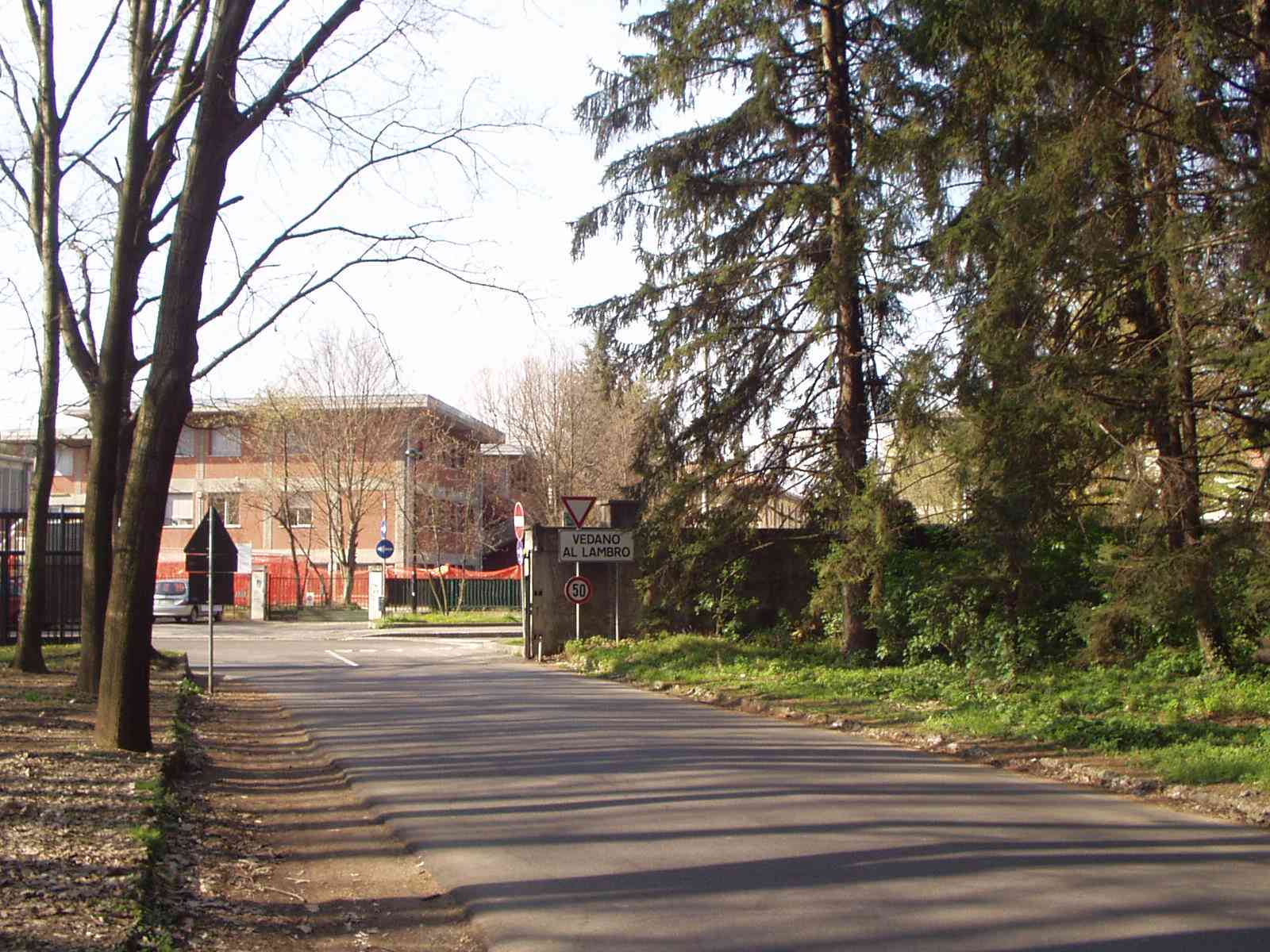 MB Monza Parco della Villa Reale di Monza - ingresso di Vedano